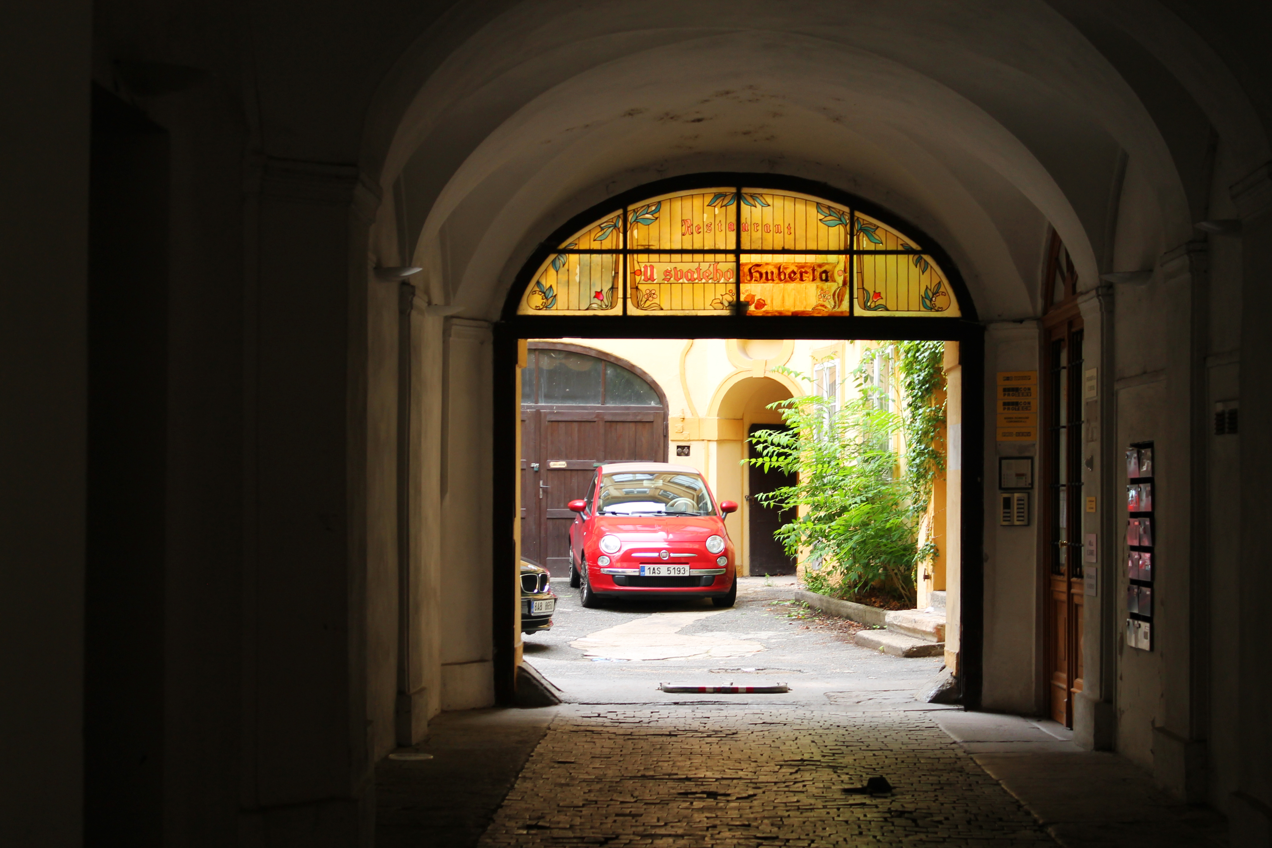 Palác Hochbergů (Staré Město), Praha 1, Husova, Zlatá 241/7, Staré Město